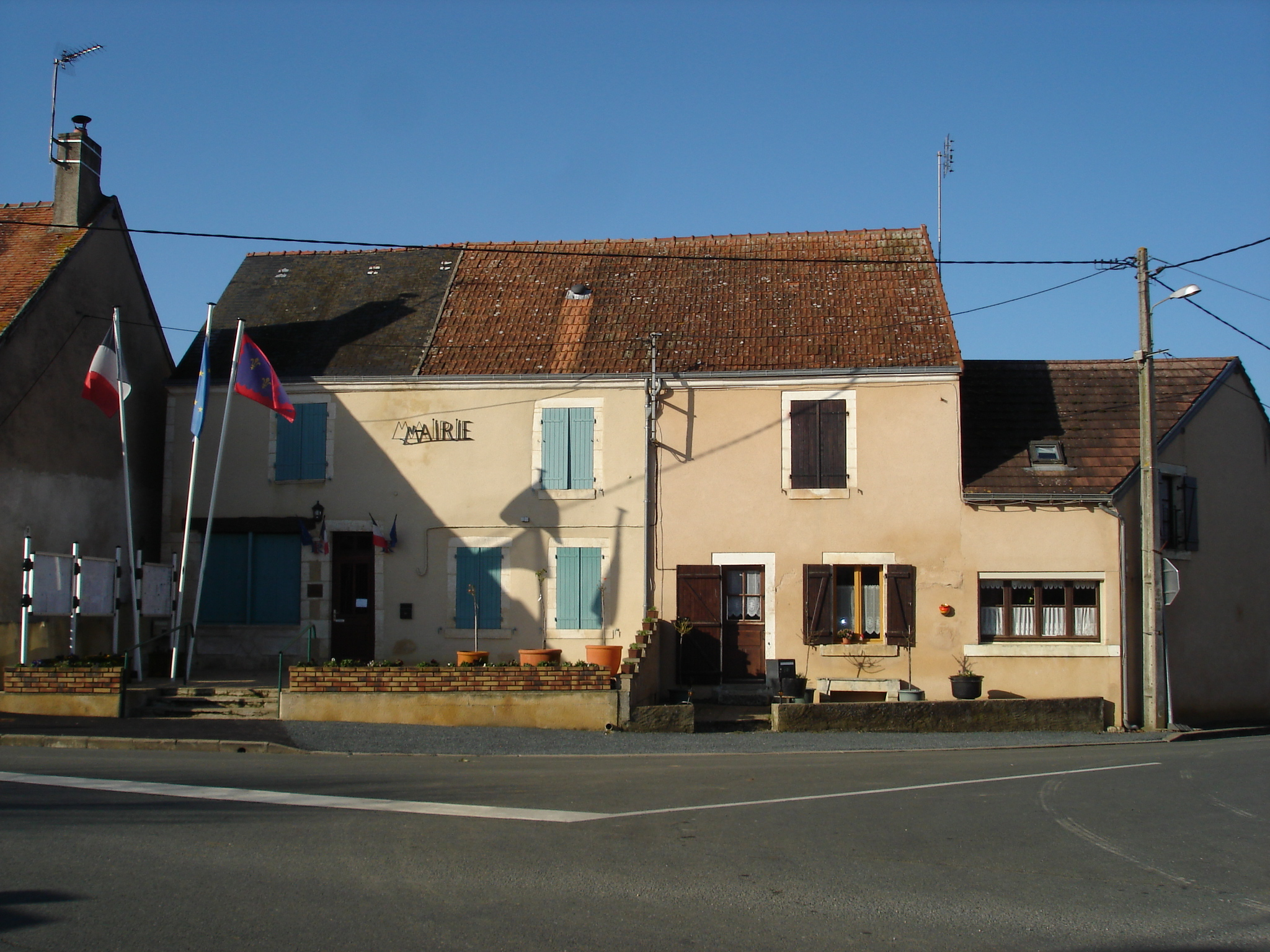 Sassierges-Saint-Germain (36) : La mairie.